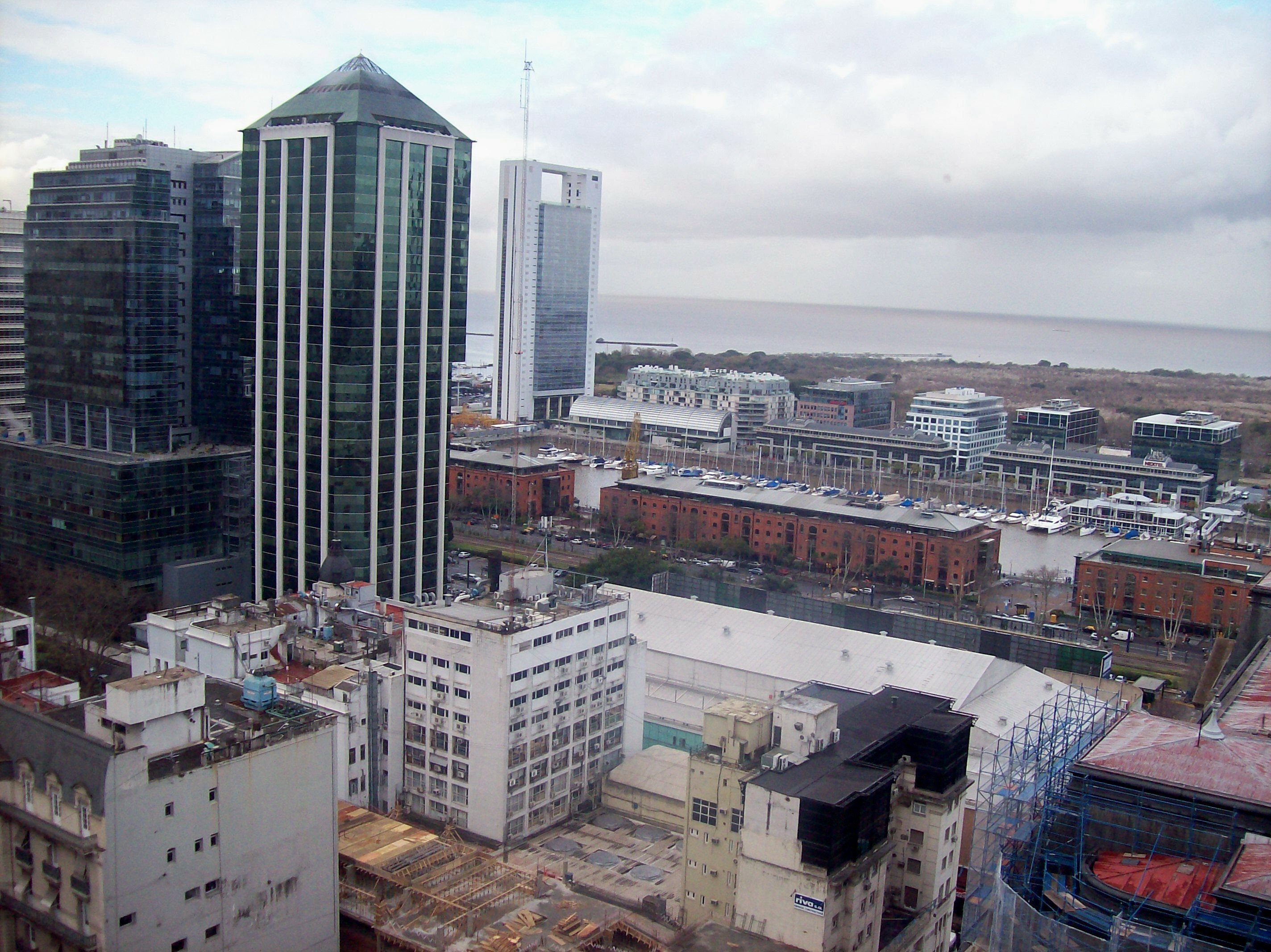 Torre Bouchard, en el barrio de San Nicolás, Buenos Aires, Argentina, visto desde el techo del edificio Comega.